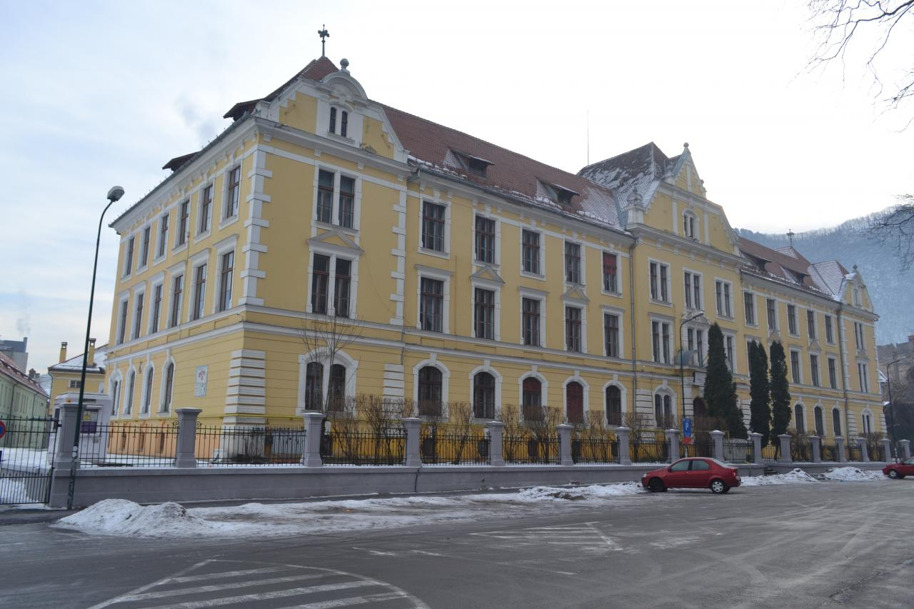 A épület